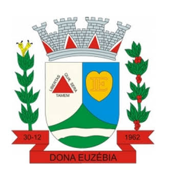 Brasão de armas do município de Dona Euzébia, Minas Gerais, Brasil.